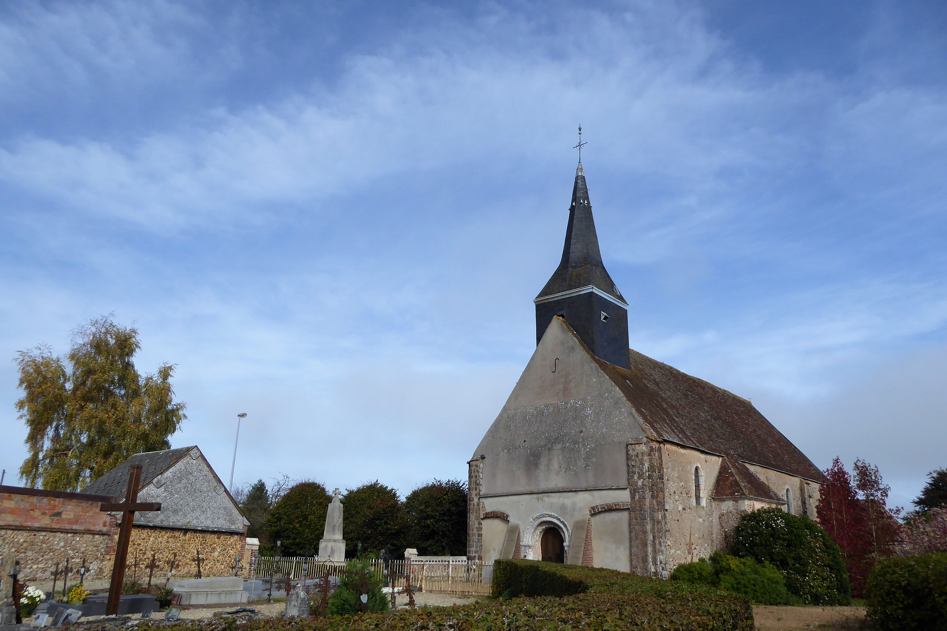 l'église Saint-Étienne entourée du cimetière, Épeautrolles, Eure-et-Loir, France.